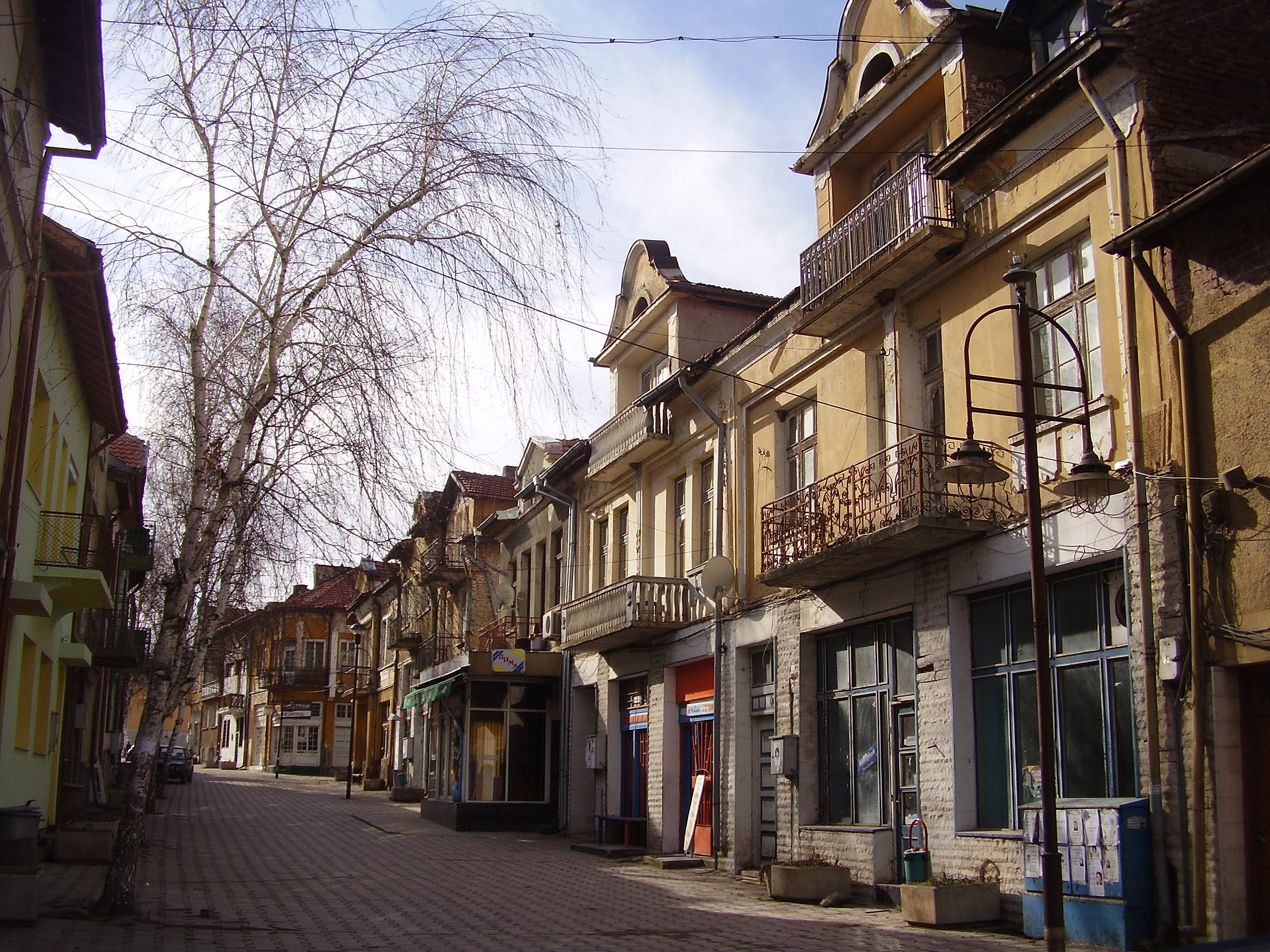 Бобошево - търговската улица